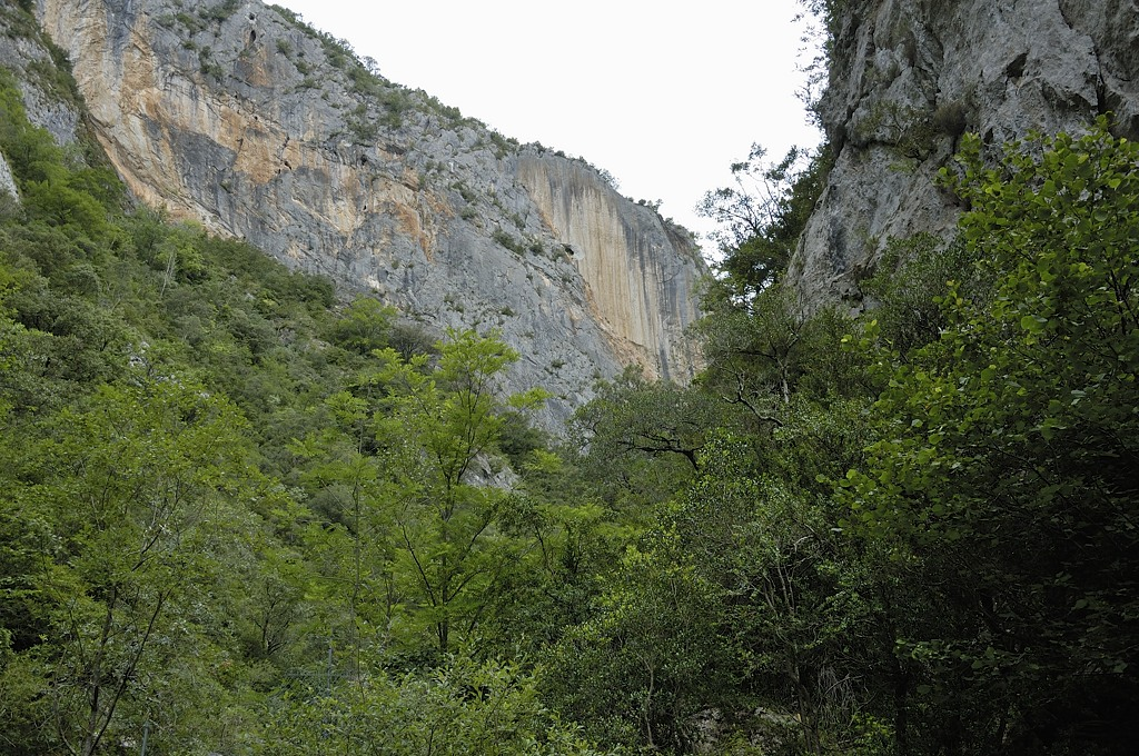 Gorges de la Fou